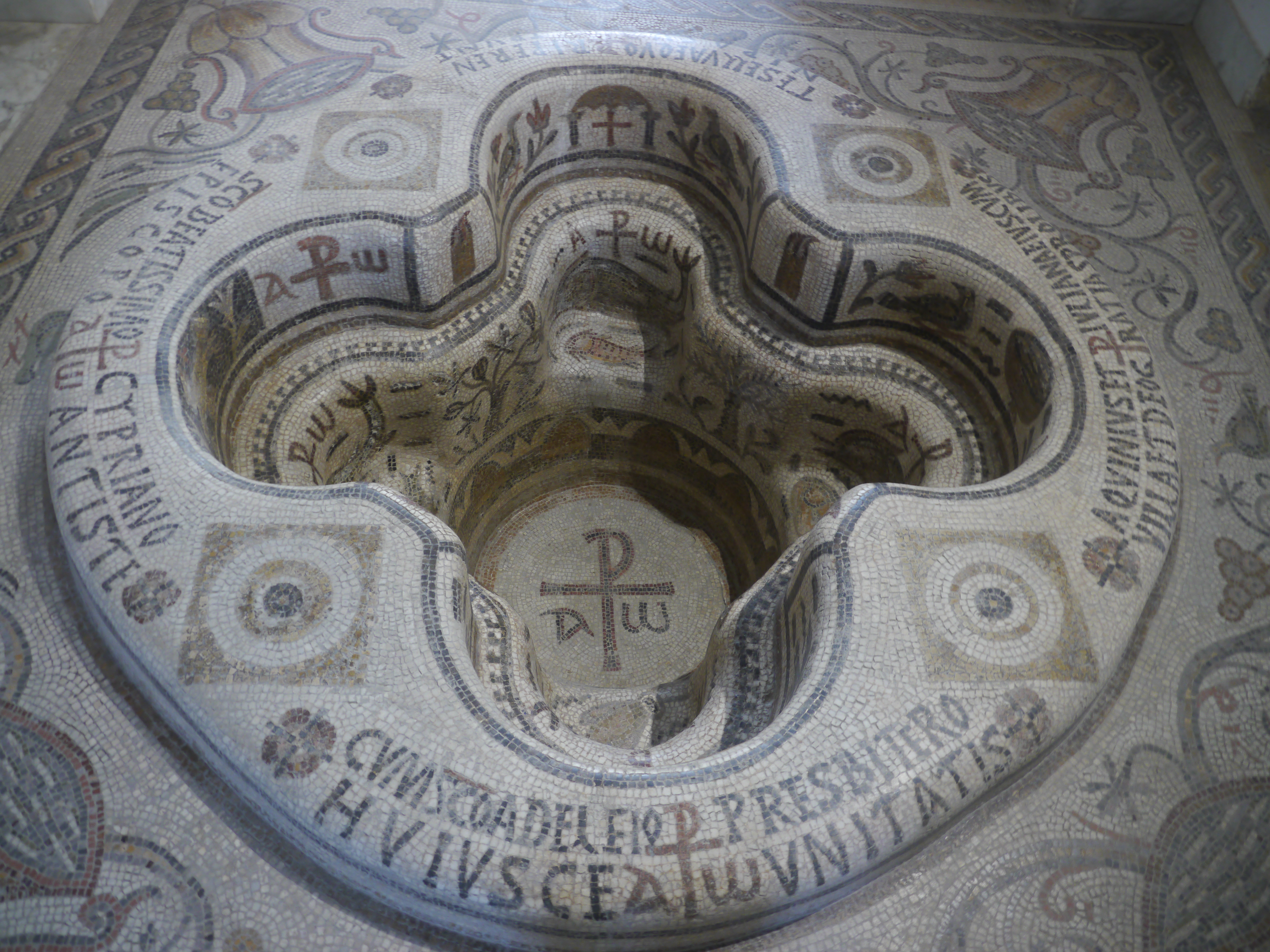 Musée Bardo